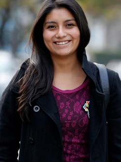 Camila Ruzlay Rojas Valderrama, diputada.